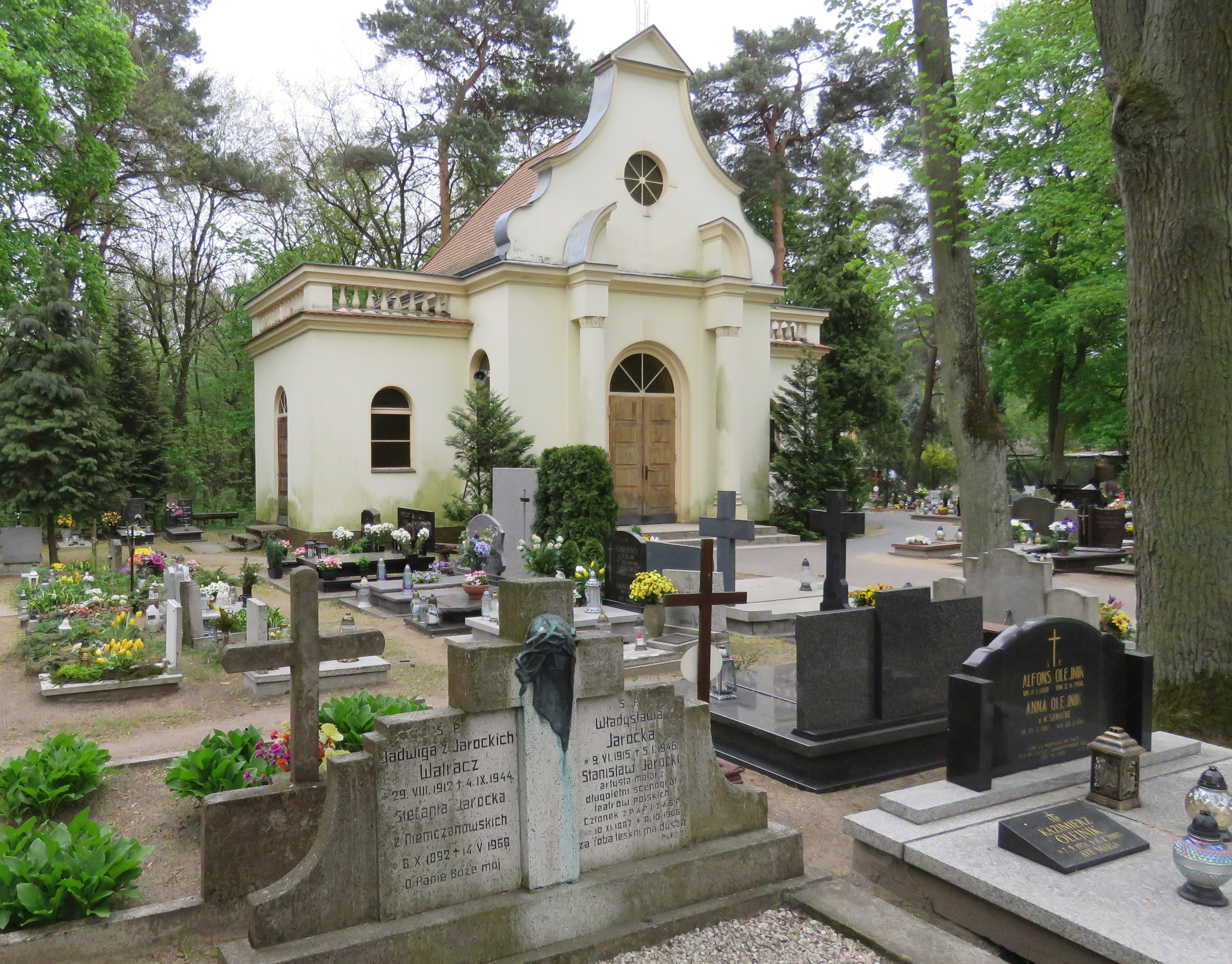 Cmentarz Rzymsko-Katolicki w Puszczykowie